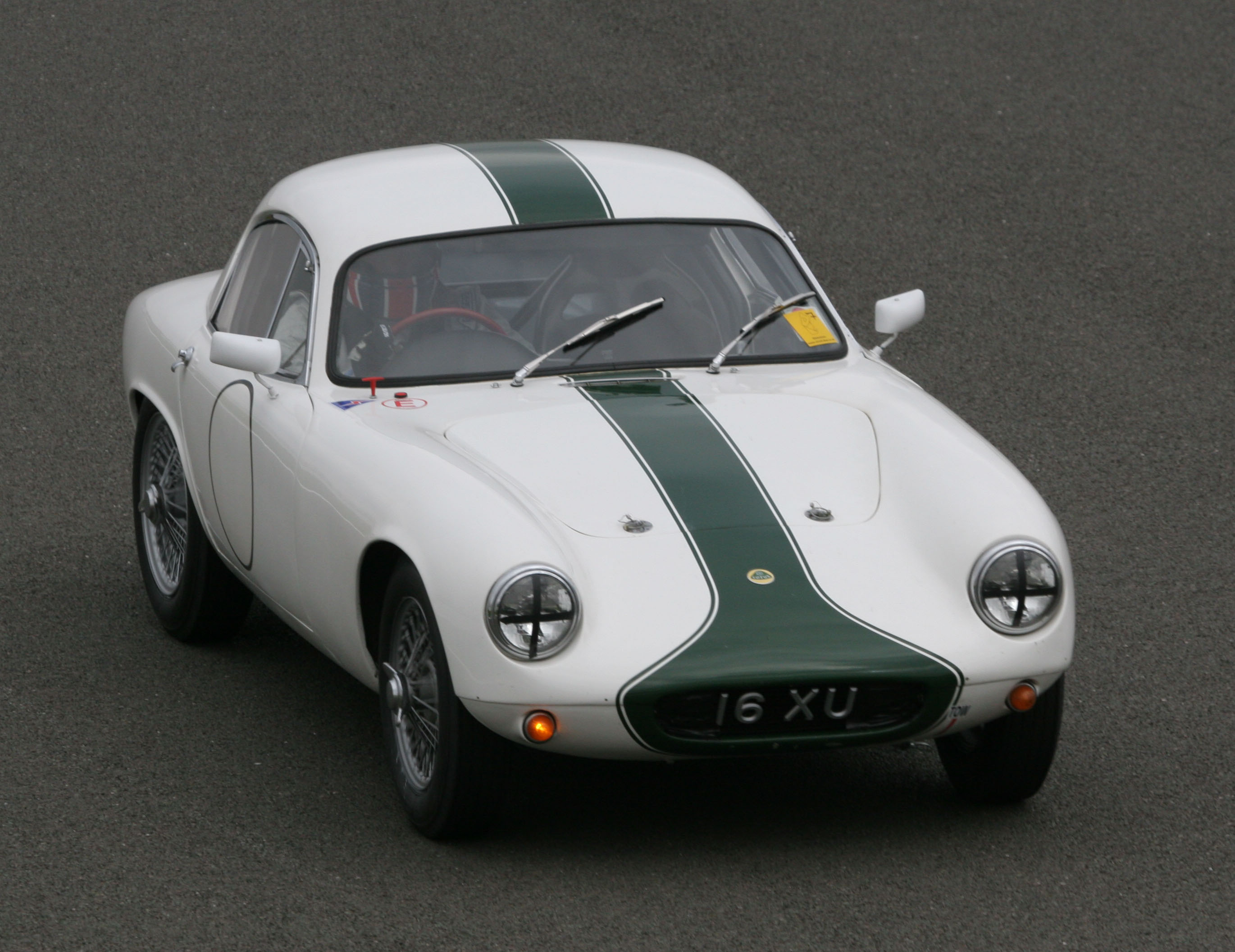 Lotus Elite